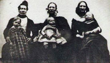 Familieportret van Thomas Dominicus Regout (1805-1862), Catharina Johanna Hubertina ("Jeannette") Ghysen (1812-1894) en drie van hun kinderen. In het midden grootmoeder Joanna Martine Ghysen-Simons. De foto uit circa 1844 zou een van de oudste familieportretten in Nederland kunnen zijn. NB: in een andere versie van deze foto ontbreken de twee middelste personen.